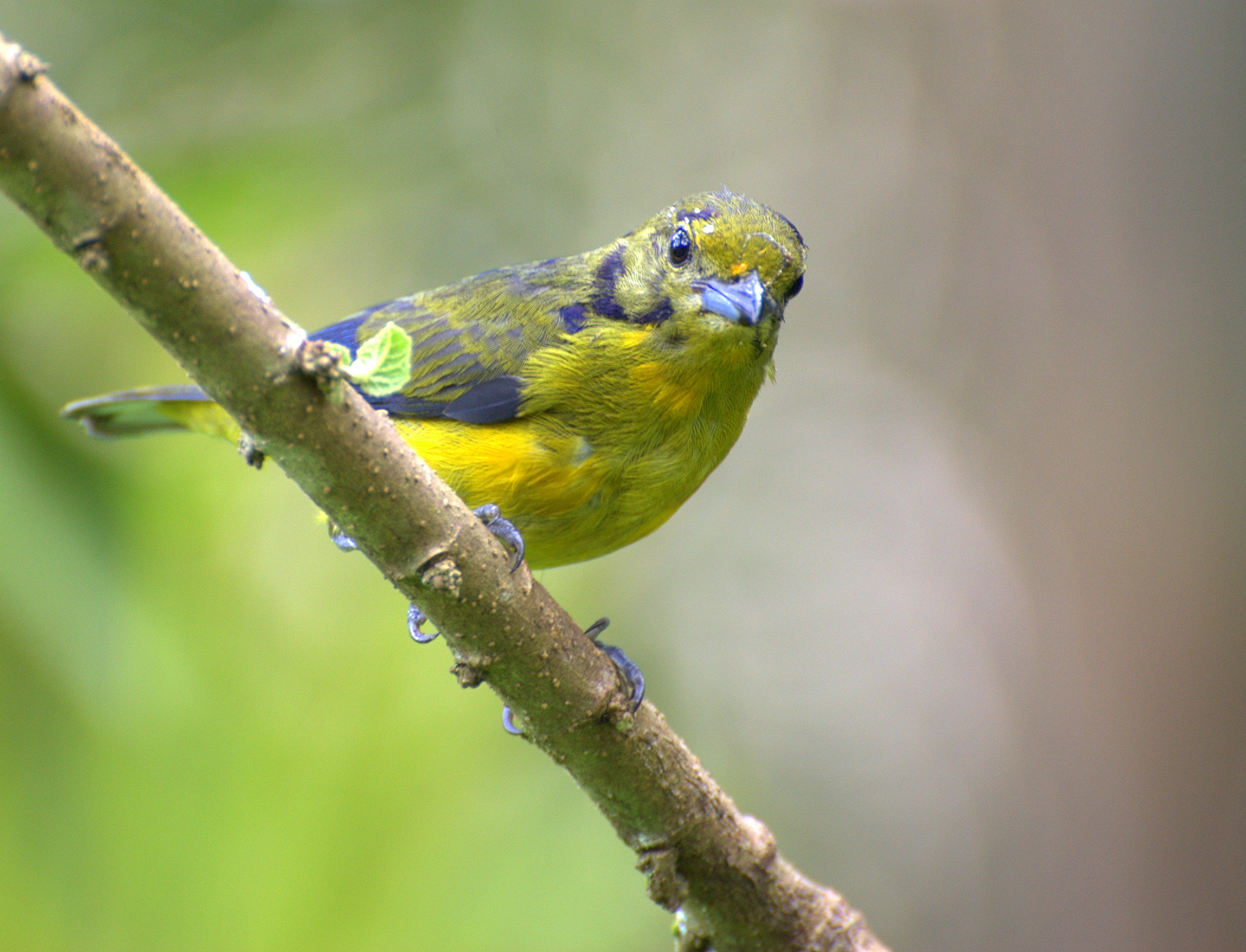 (Euphonia violacea) No quintal da casa da minha sogra na cidade de Registro-SP